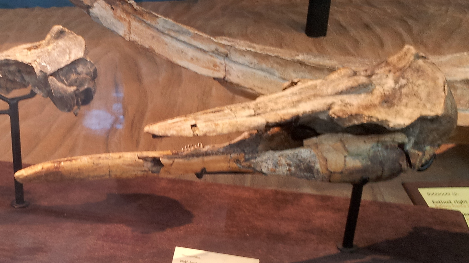 Semirostrum ceruttii.